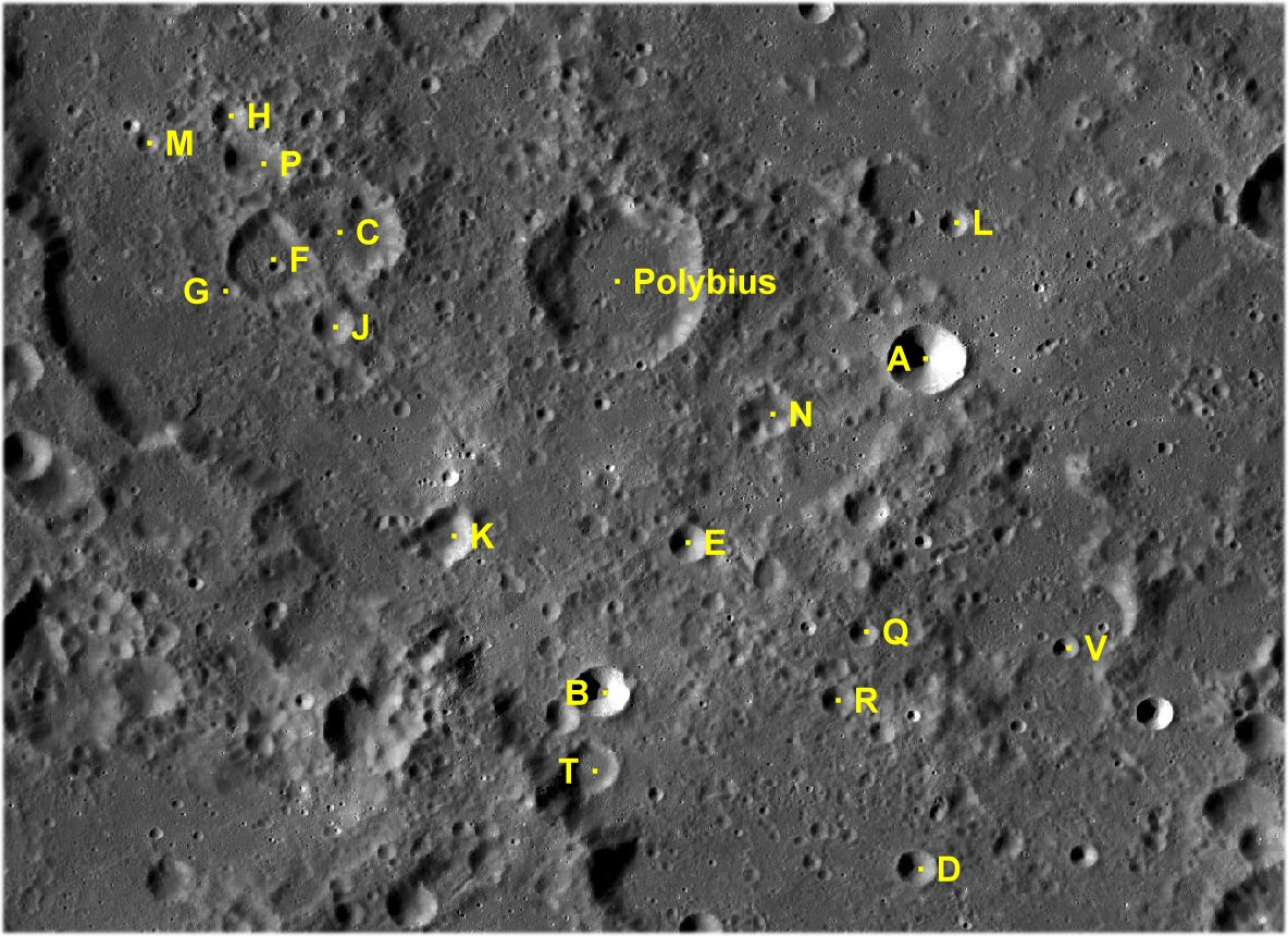 Cráter lunar Polybius. Cráteres satélite. (Imagen LRO)